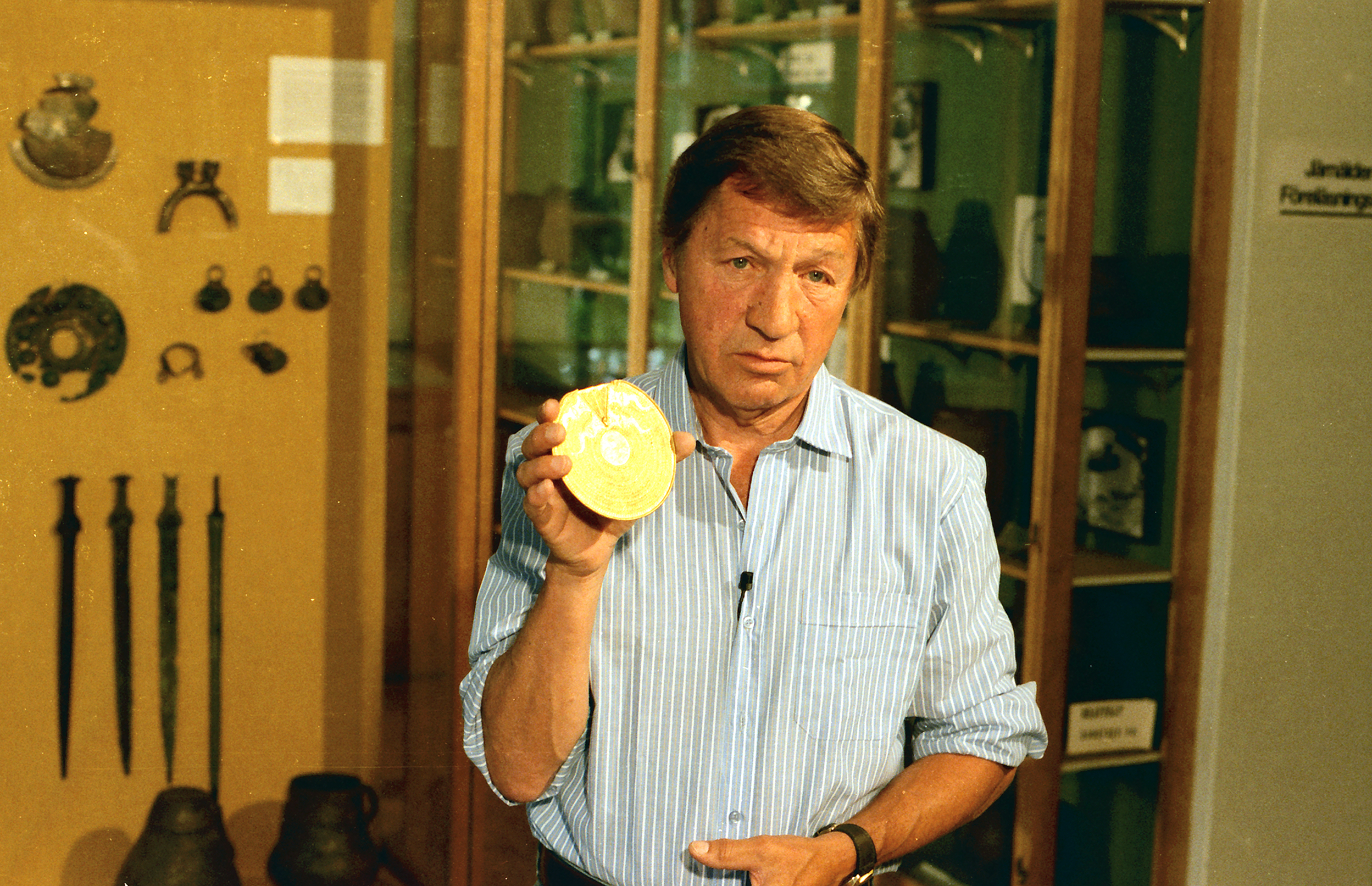 Leif Hedenberg 1984 på Historiska museet i Lund under Sveriges Televisions inspelning av dokumentärfilmerna "Syudskandinavisk forntid".